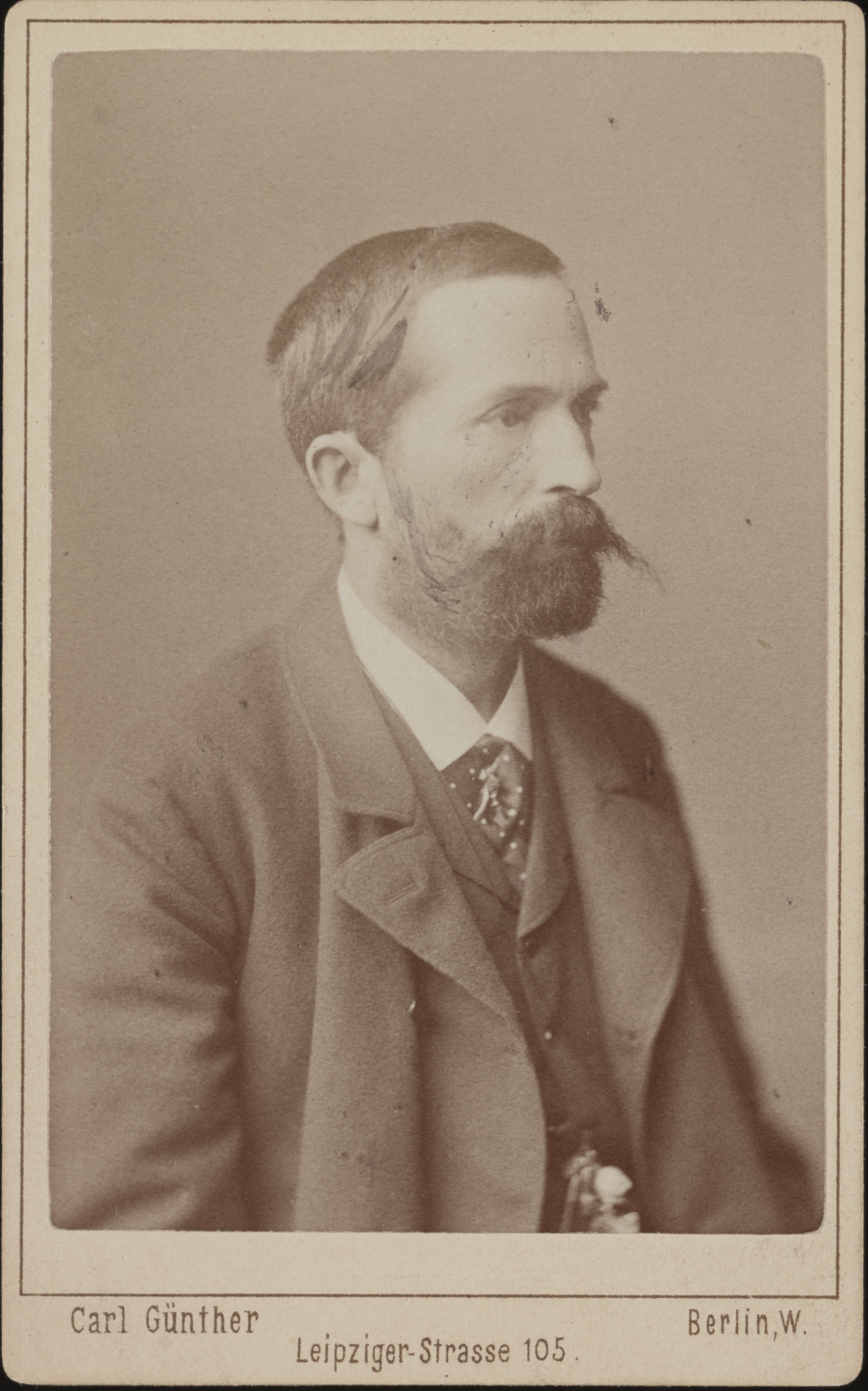 Friedrich Hermann Otto Finsch (8 August 1839 – 31 January 1917)